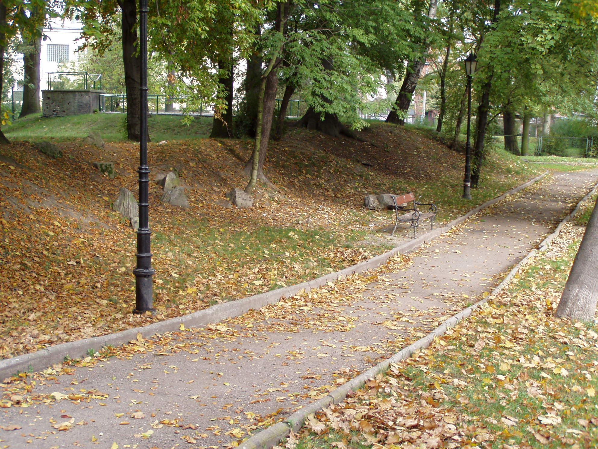 foto